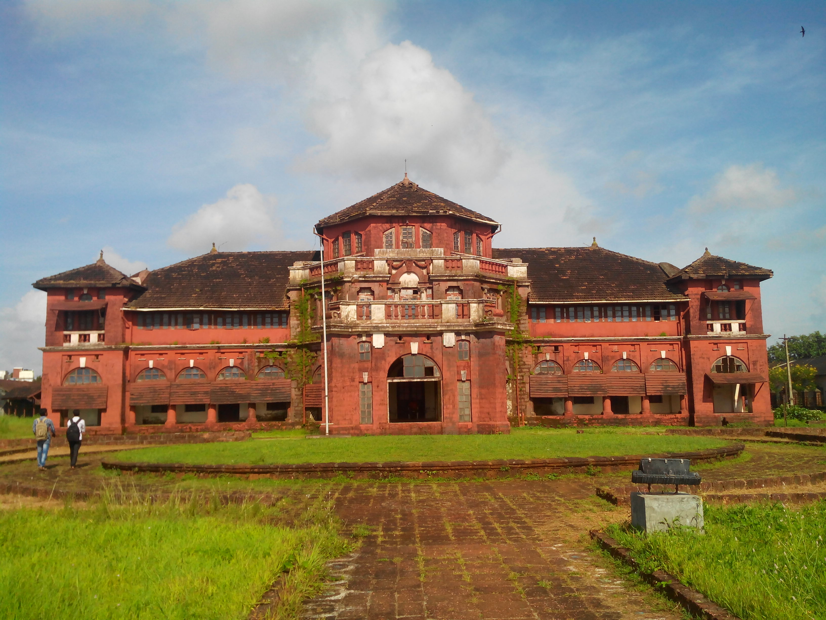 Thiba Palace Ratnagiri